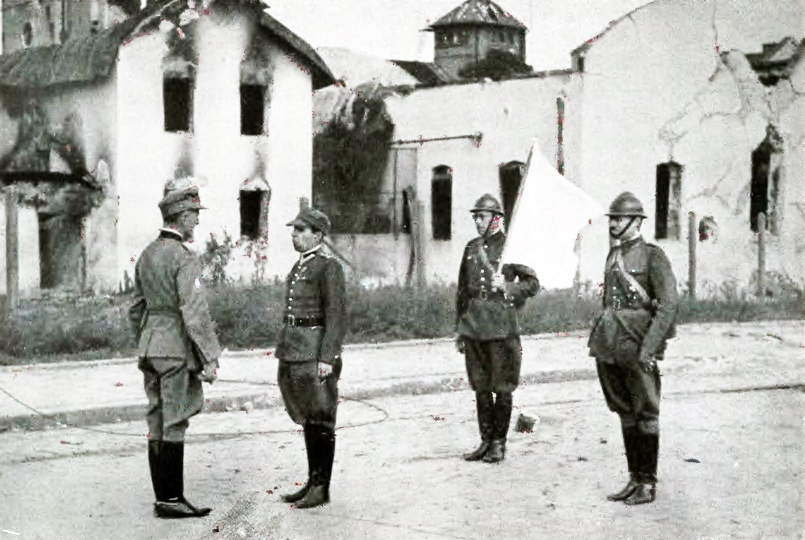 Spotkanie polskich parlamentariuszy z przedstawicielami armii niemieckiej na ulicy Gródeckiej we Lwowie